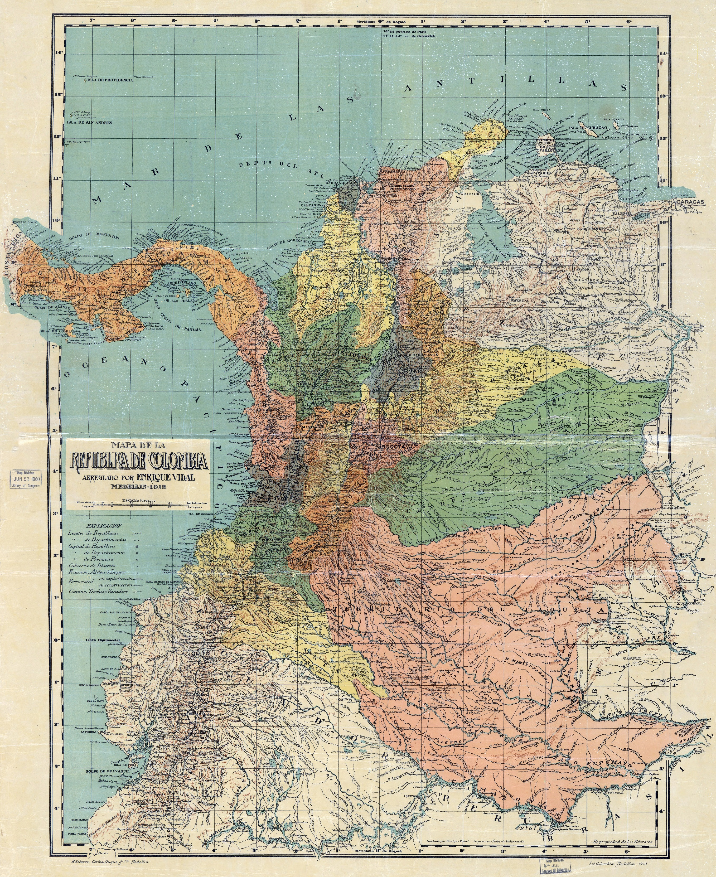 Mapa de la República de Colombia en 1912